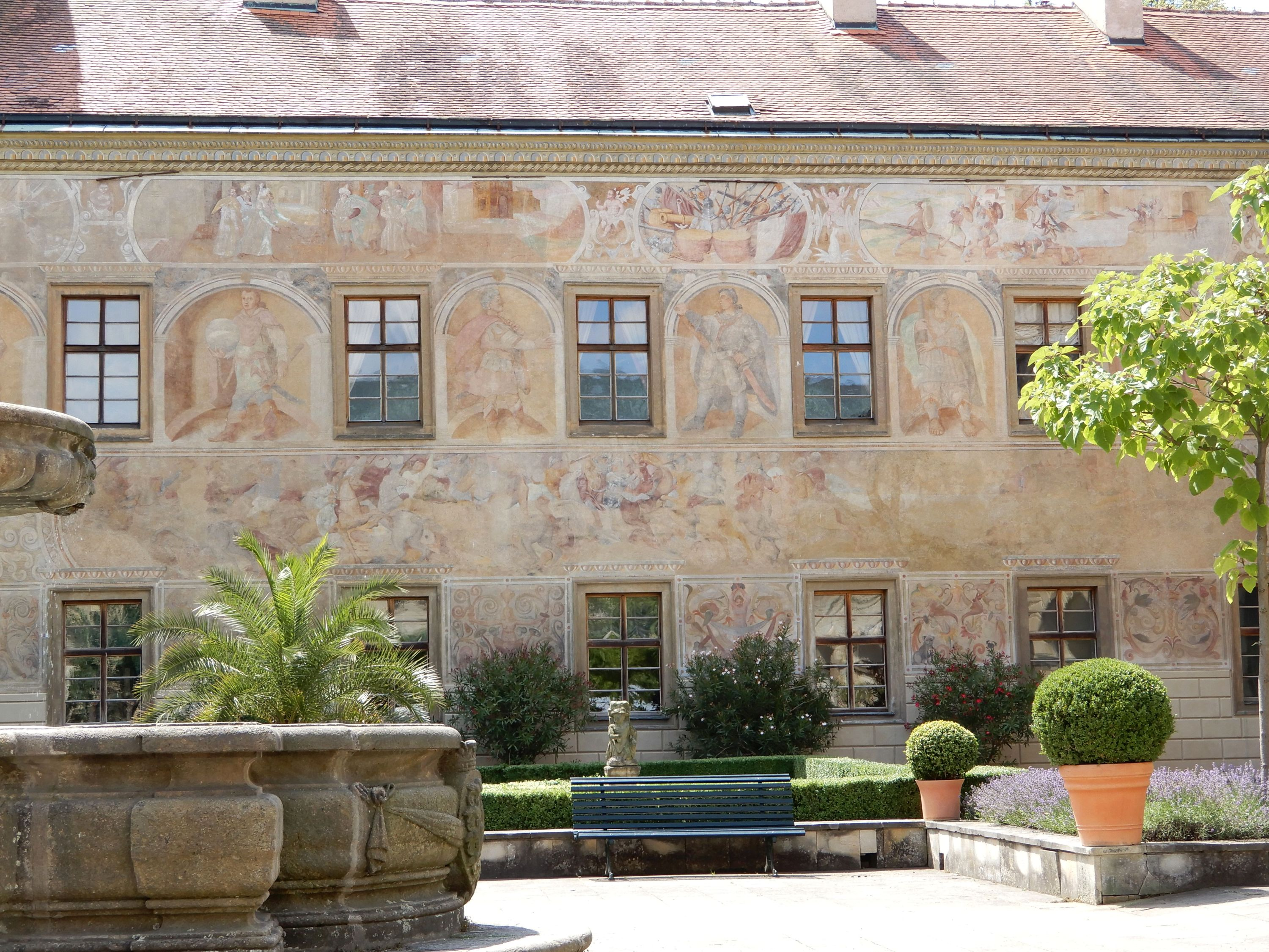 Častolovice, zámecké nádvoří, renesanční freskyː 6 římských císařů, římské bitvy, datováno rokem 1601